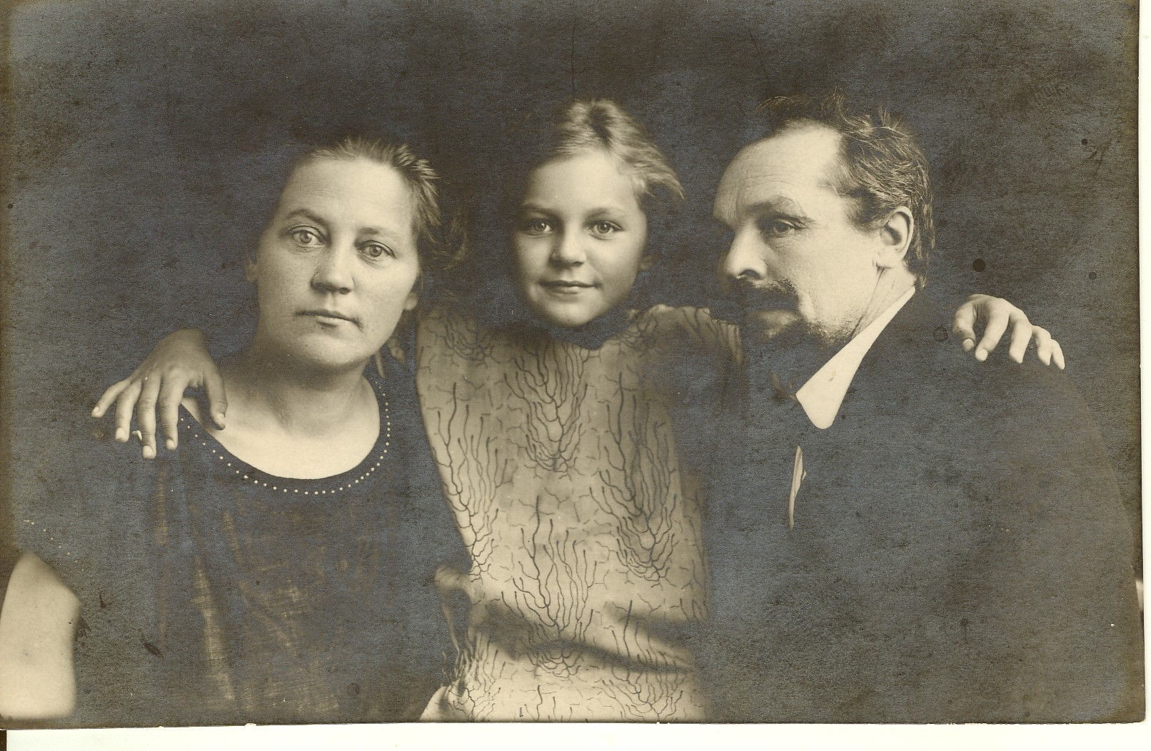 Türi fotograaf Aadu Treufeldt abikaasa ja tütar Sentaga, poolportree.